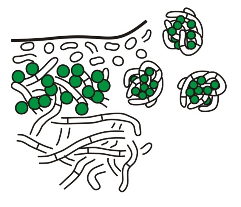 Soredium